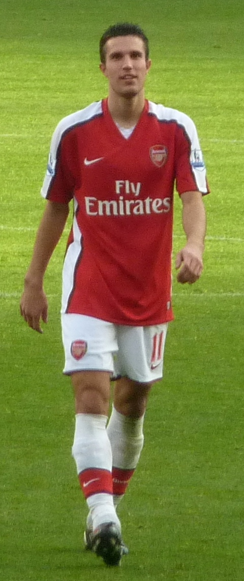 Robin van Persie